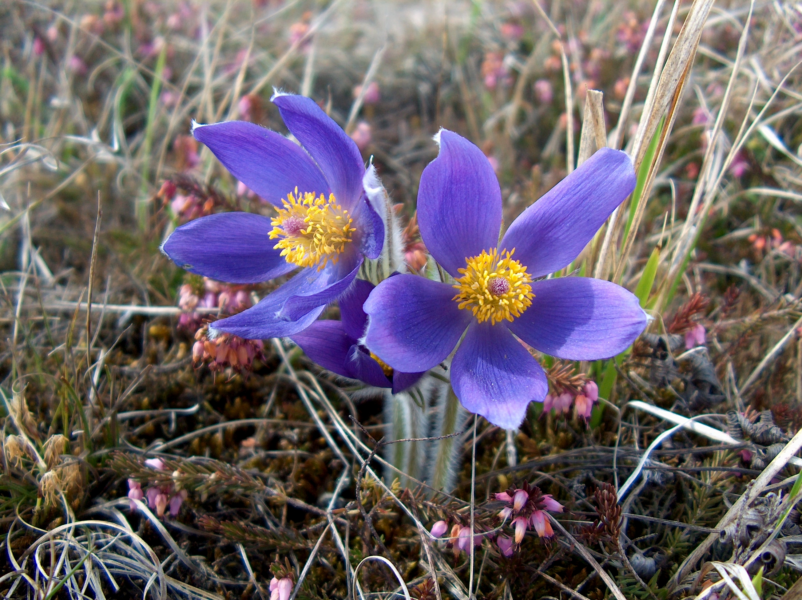 Kuhschellen auf der Garchinger Heide